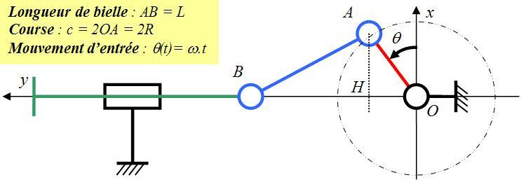 schéma plan du système bielle manivelle avec piston dans l'axe (en réalité axe manivelle et axe piston concourants). Paramétrage.